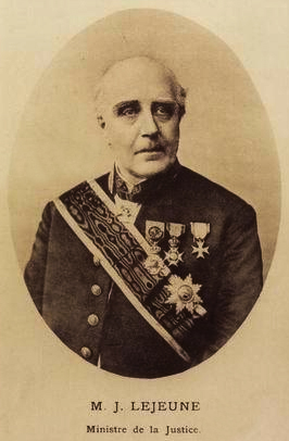 Jules Le Jeune (1828-1911) - Ministre belge de la justice